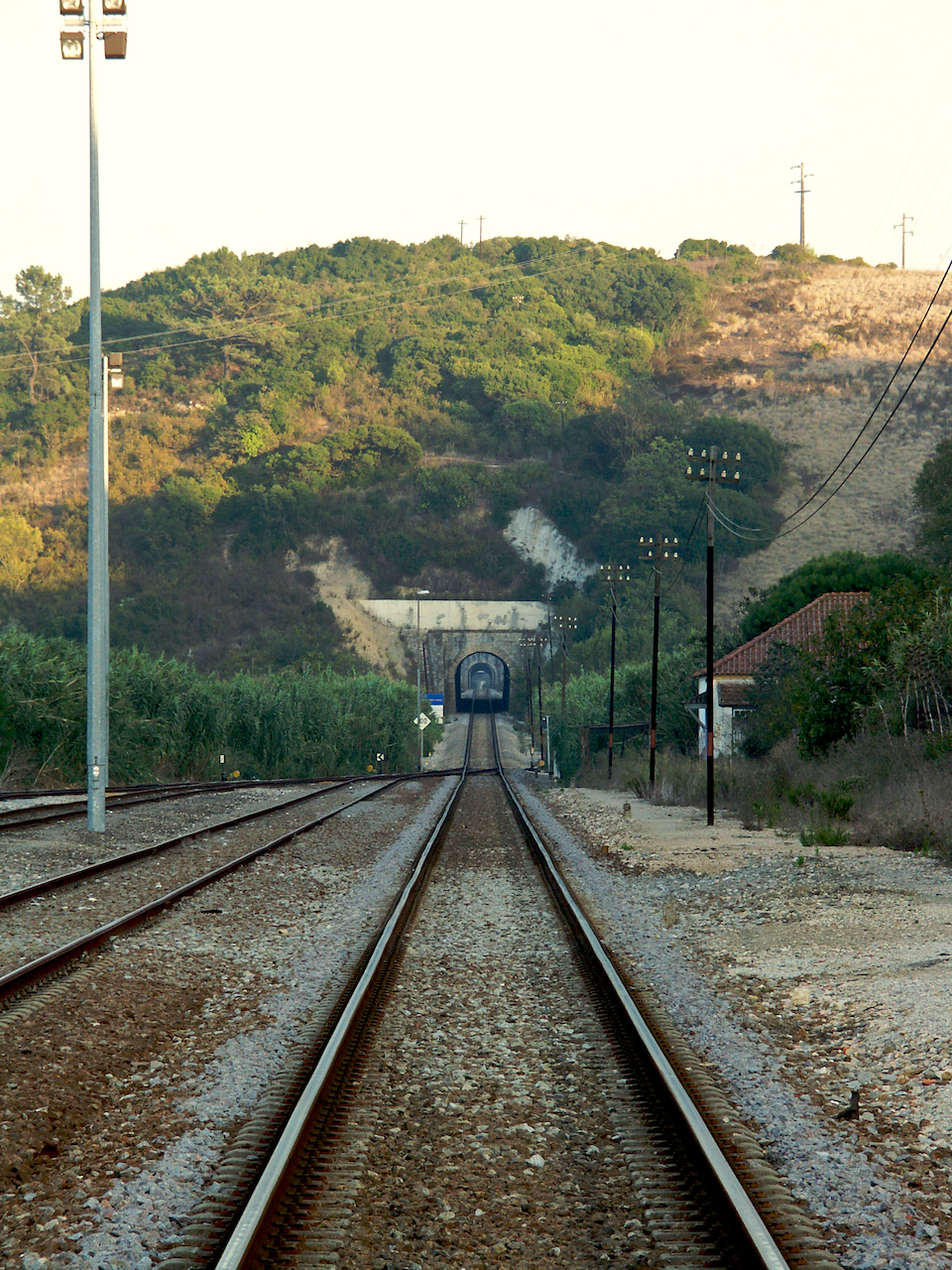 Via férrea: Linha do Oeste [PK 64] Local: Estação de Torres Vedras Data e hora: 21 de Setembro de 2004 [18h48] Sentido: Cacém ao fundo, os Túneis da Certã, do Cabaço e da Boiaca.